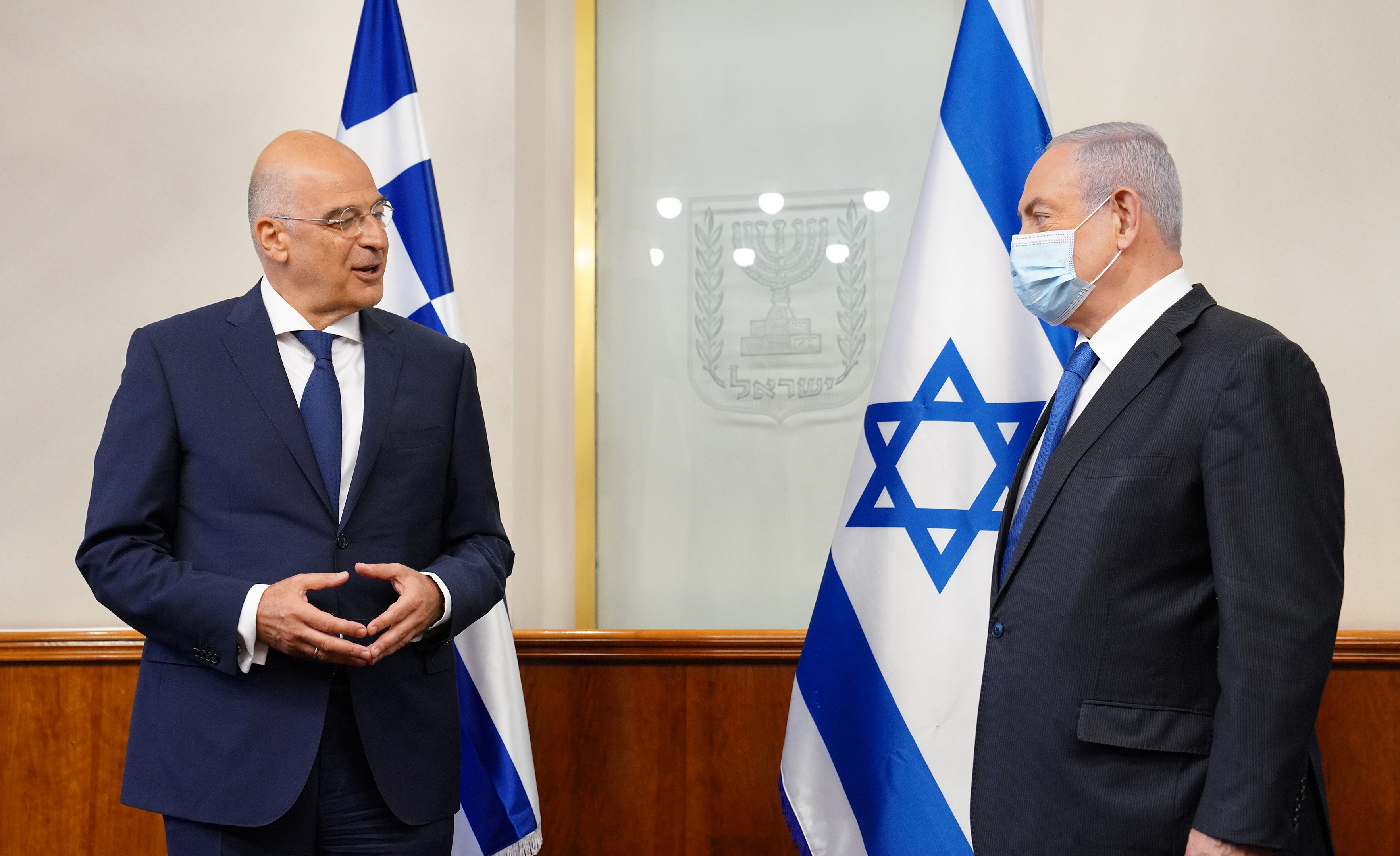 Επίσκεψη ΥΠΕΞ, Ν. Δένδια στο Ισραήλ (13.08.2020)-Συνάντηση ΥΠΕΞ Ν. Δένδια με ΠΘ Ισραήλ B. Netanyahu